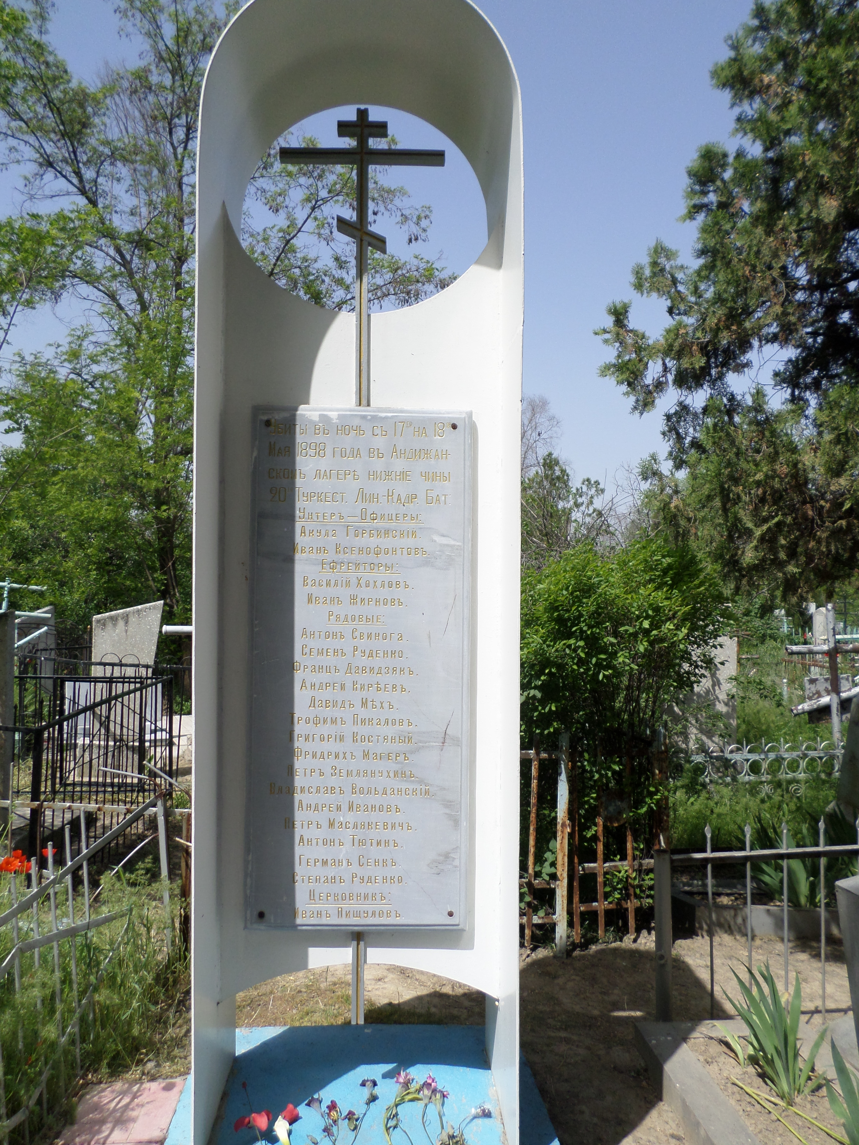 Chapel of St. George in Andijan